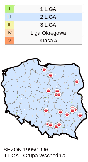 Jagiellonia w sezonie 1995/96 mapa